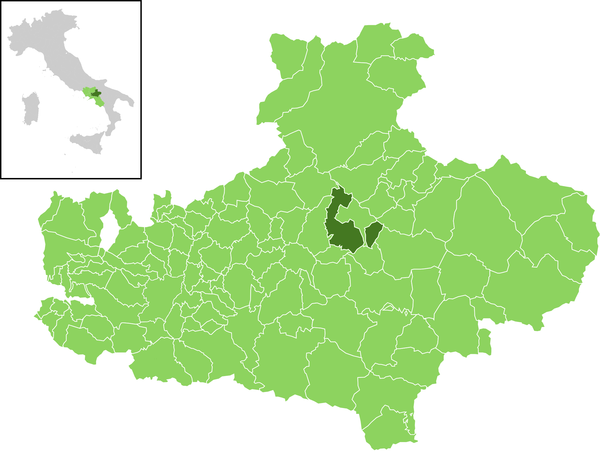 mappa del territorio del Comune di Frigento (AV)